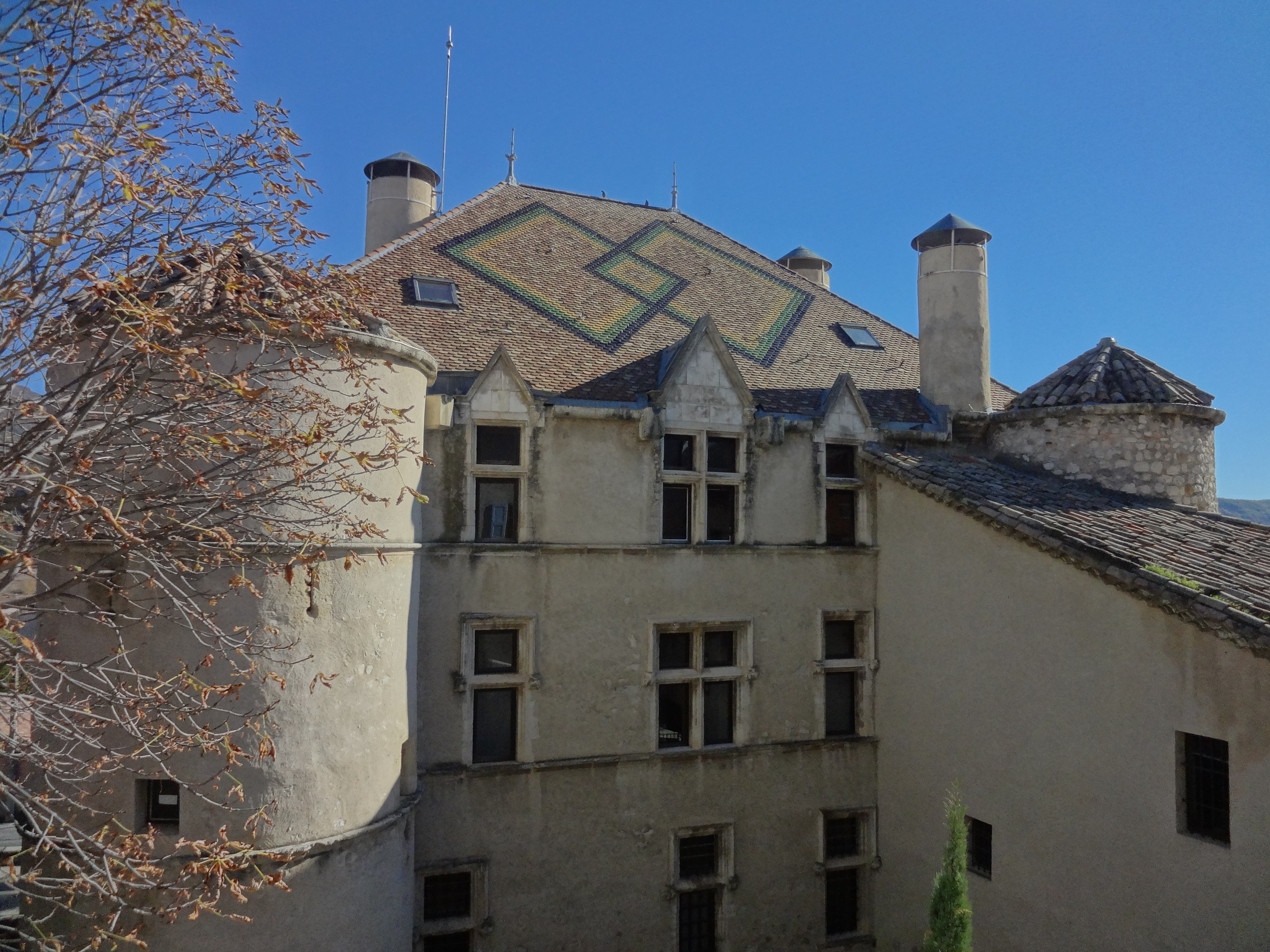 Façade ouest du château de Château-Arnoux (qui abrite la mairie). Toit en tuiles vernissées.